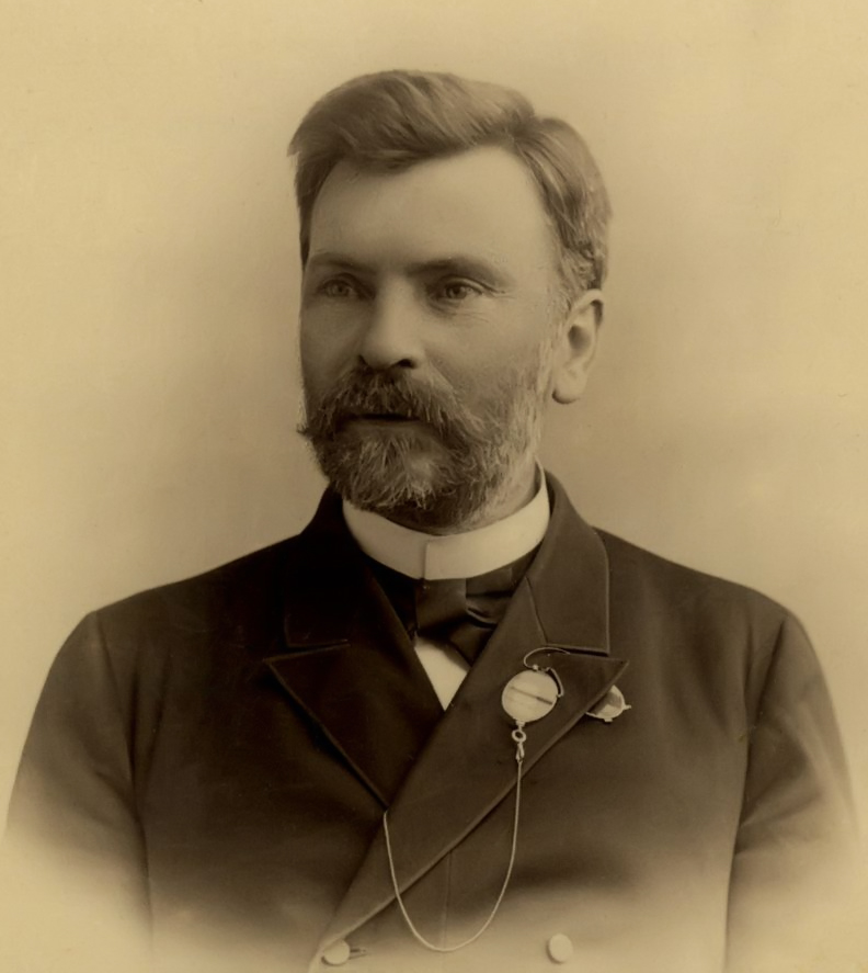 Ковалевский Владимир Иванович - российский государственный деятель, учёный и предприниматель